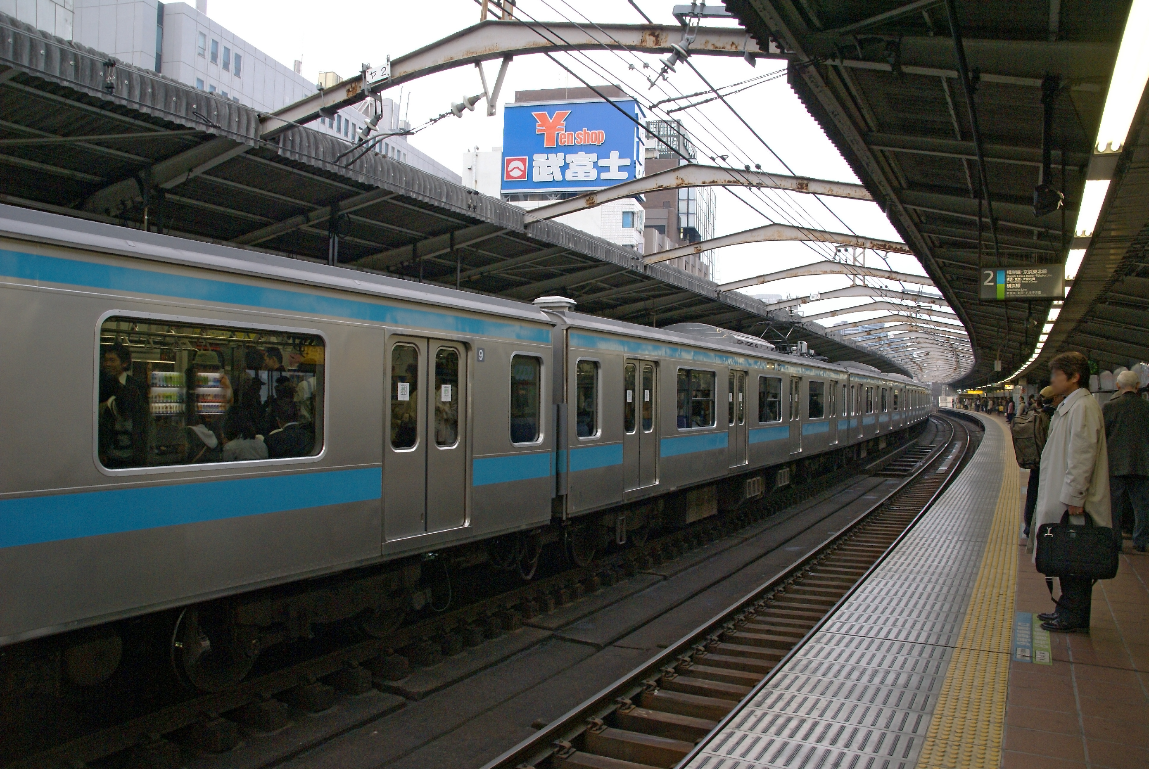 Kannai station in Yokohama, Kanagawa, Japan